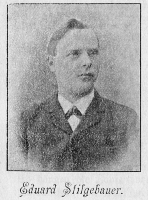 Porträt Eduard Stilgebauer